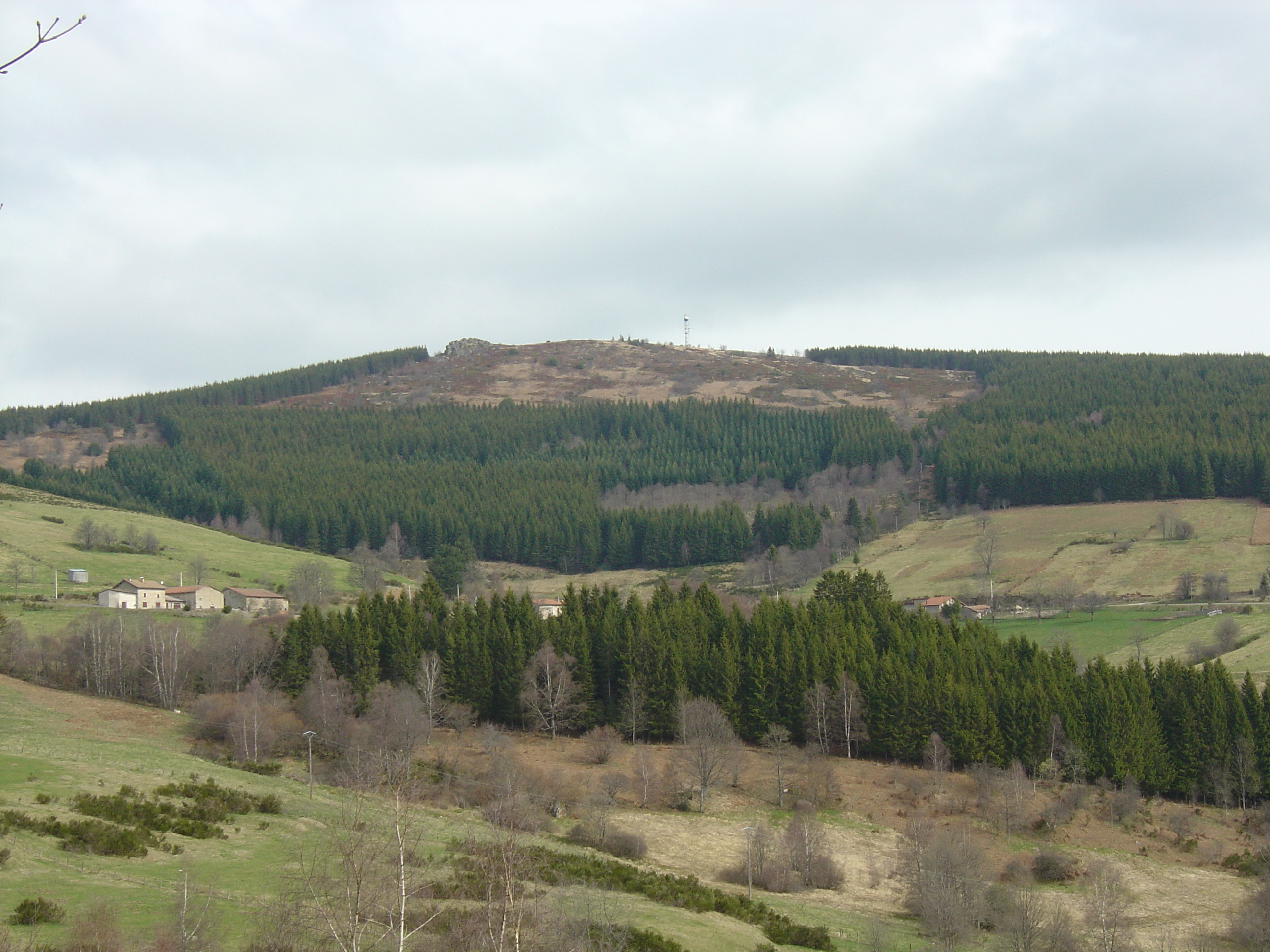 Sommet du Vimont (1348 m) dans le Haut-Forez, situé sur la commune de La Chamba (Loire)